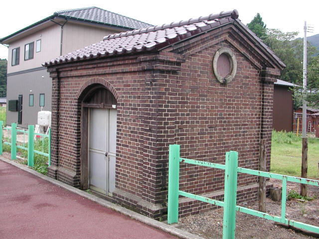 JR磐越西線 馬下駅のランプ小屋 2004-09-05 user:Hitam1200撮影，2004-09-05 撮影者が日本語版ウィキペディアにアップロード